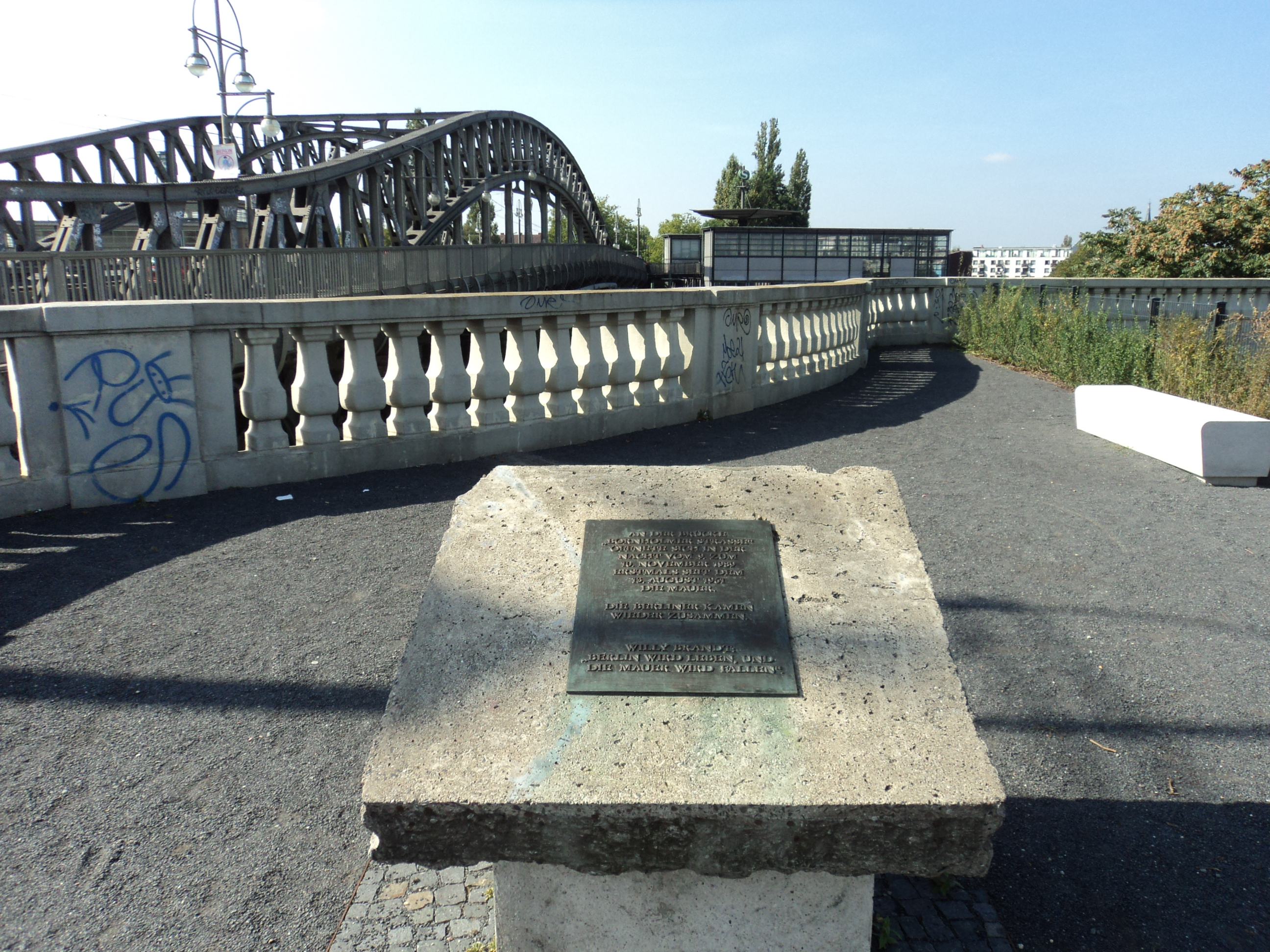 Baudenkmal - Bösebrücke ( Gedenktafel ) Baudenkmal - Straßenbrücke Bornholmer Straße - Bornholmer Straße Berlin - Prenzlauer Berg + Gesundbrunnen Quelle : Landesdenkmalliste Dok Nr. 09030358 Quelle